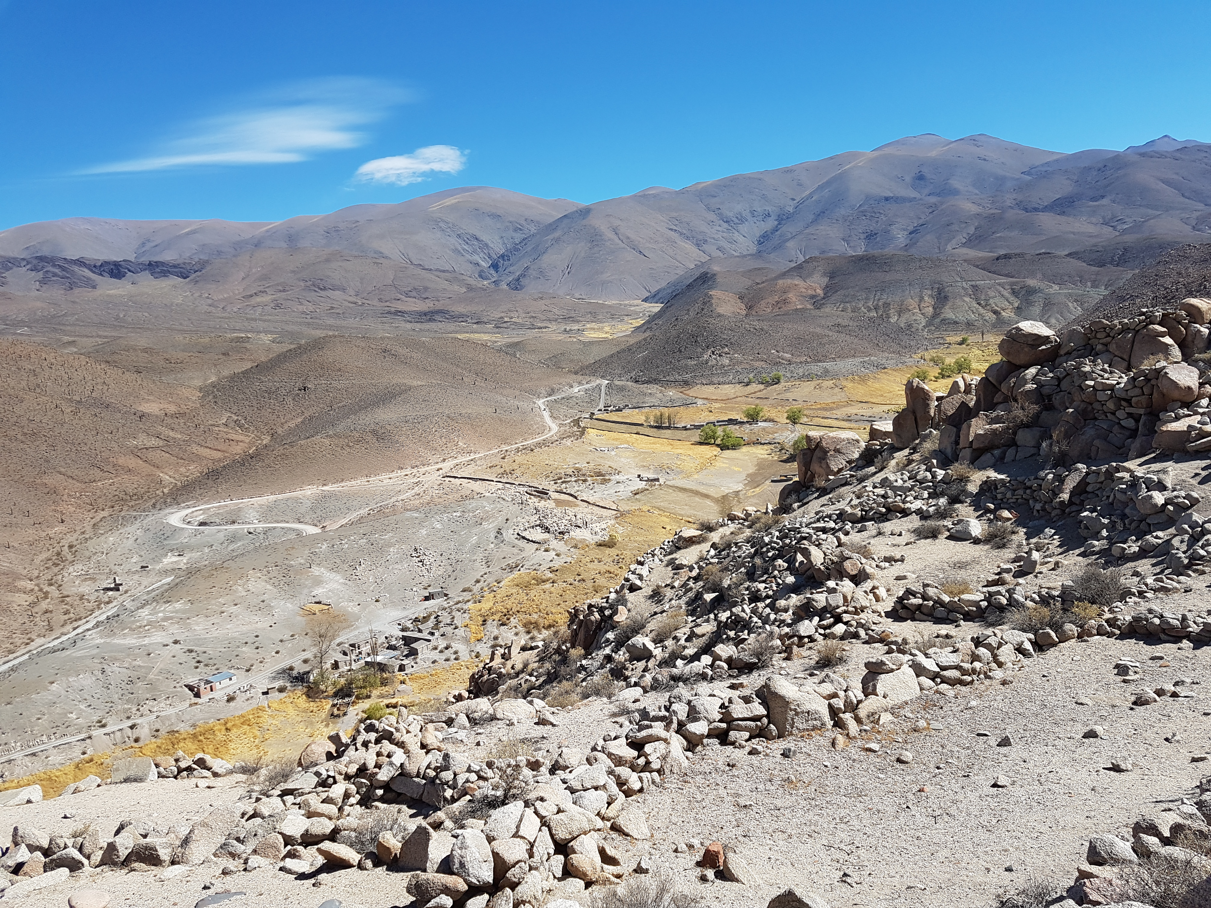 monumento natural. cultural